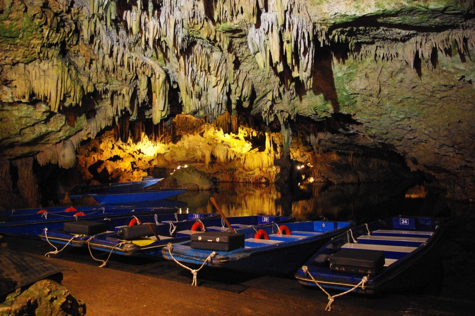 Tropfsteinhöhle bei Pyrgos Dirou, Gemeinde Itylo, Einstiegsplatz für die Bootsfahrt